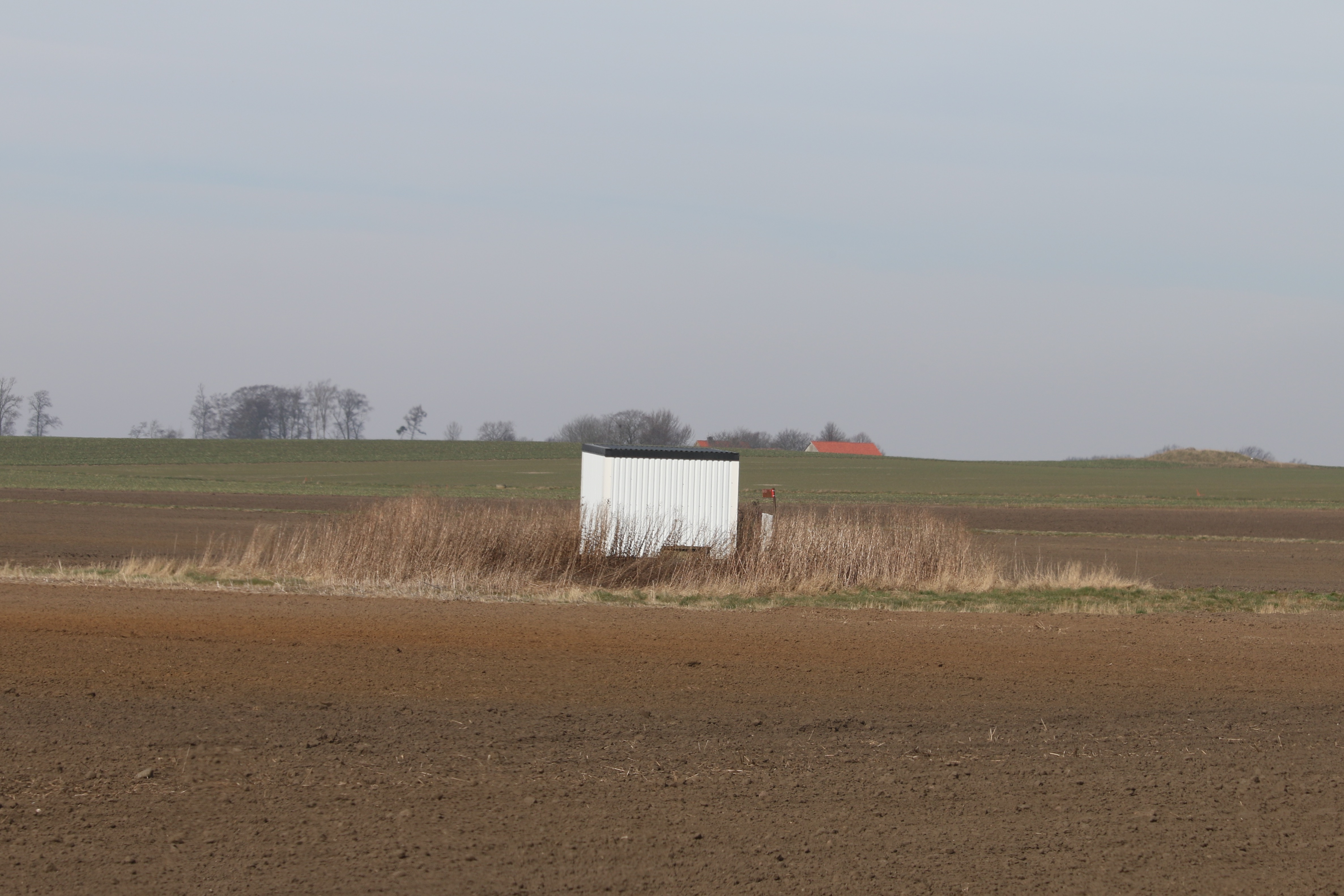 Röekillorna, arkeologisk fyndplats